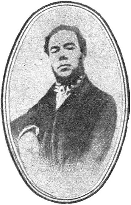 "Benjamin Clemenceau, père de Georges".